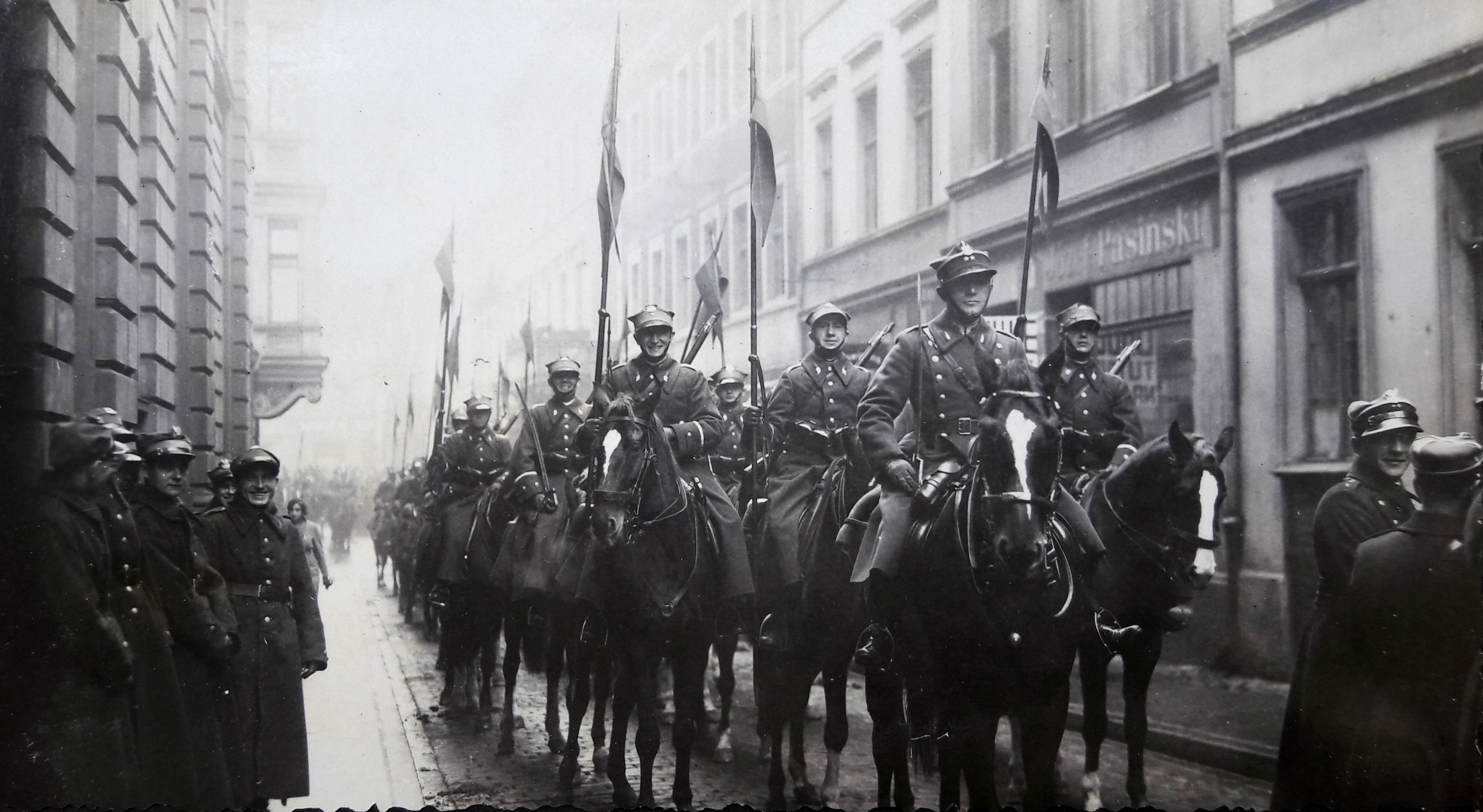 Szwadron szkolny Szkoły Podchorążych dla Podoficerów na ulicy w Bydgoszczy. Na czele por. Stanisław Bazylczuk, instruktor; rok 1934.